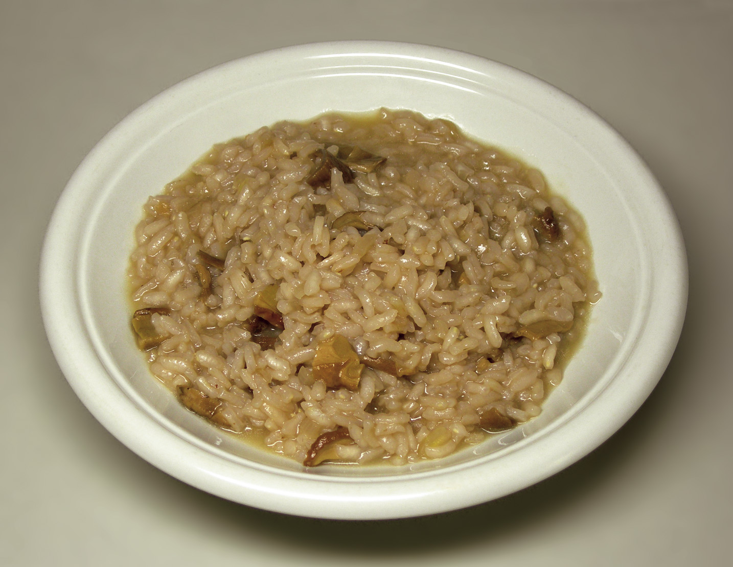 Risotto mit Steinpilzen (boletus)